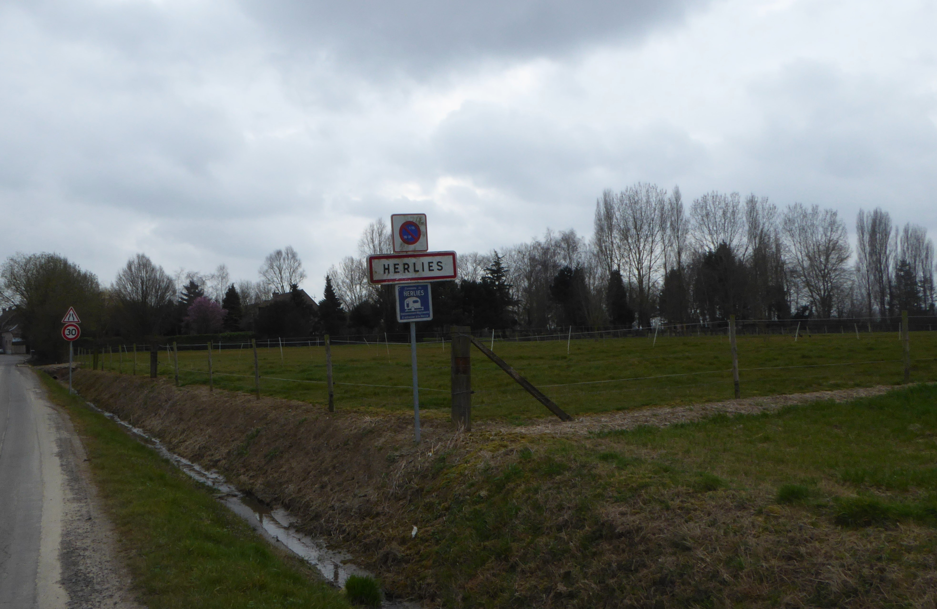 city limit Herlies Nord Nord-Pas-de-Calais-Picardie France.